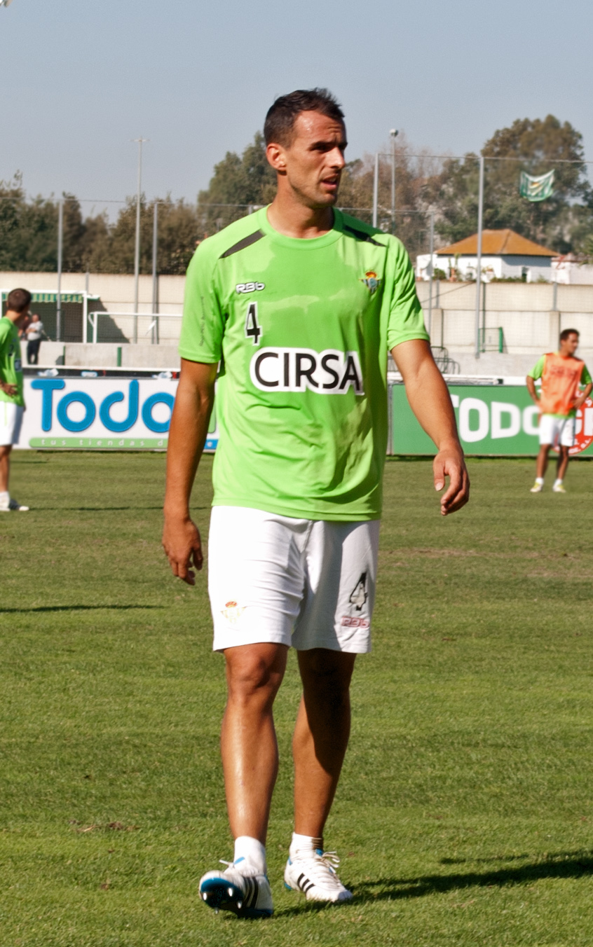 Antonio Amaya durante un entrenamiento del Real Betis, temporada 2011/12